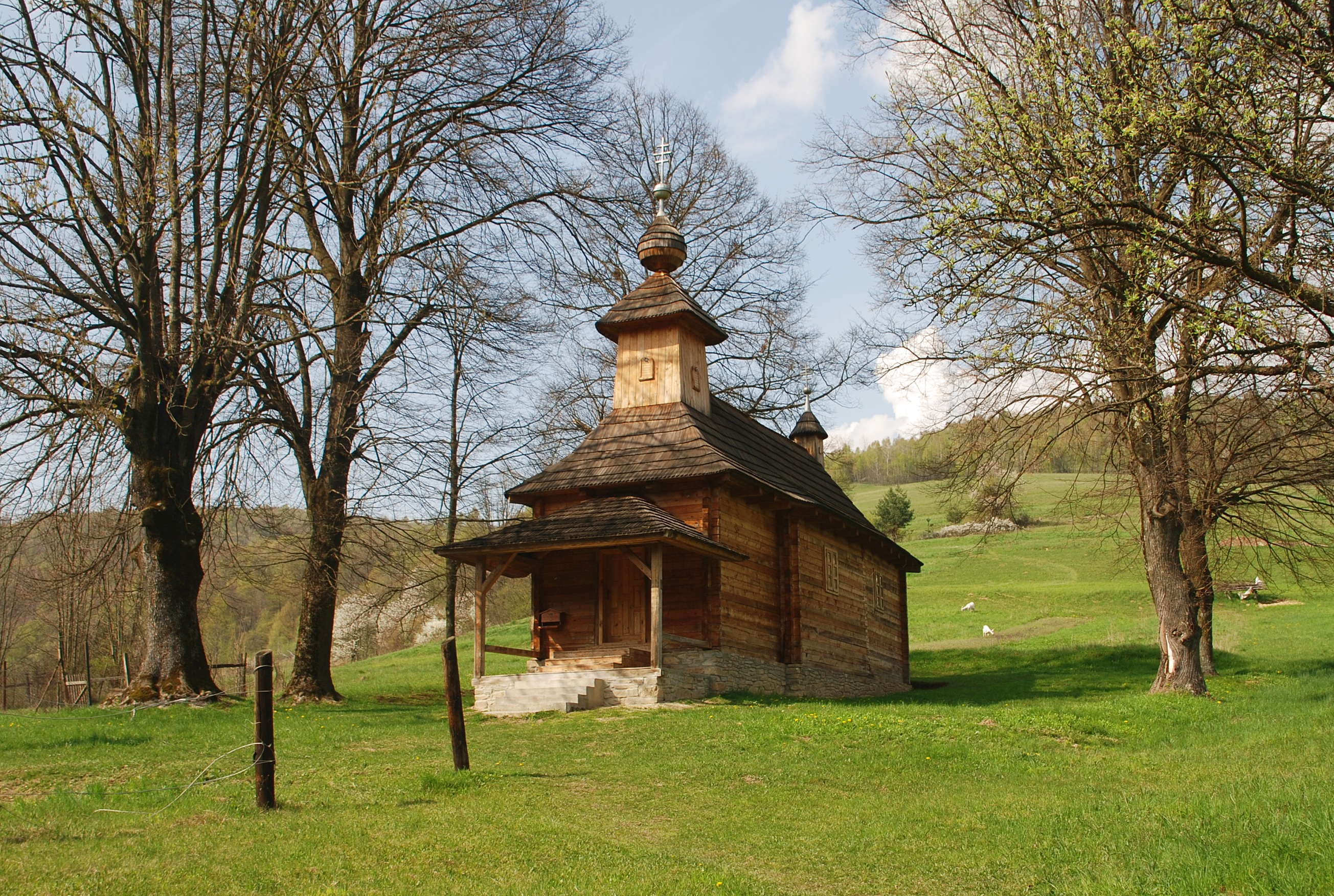 cerkiew